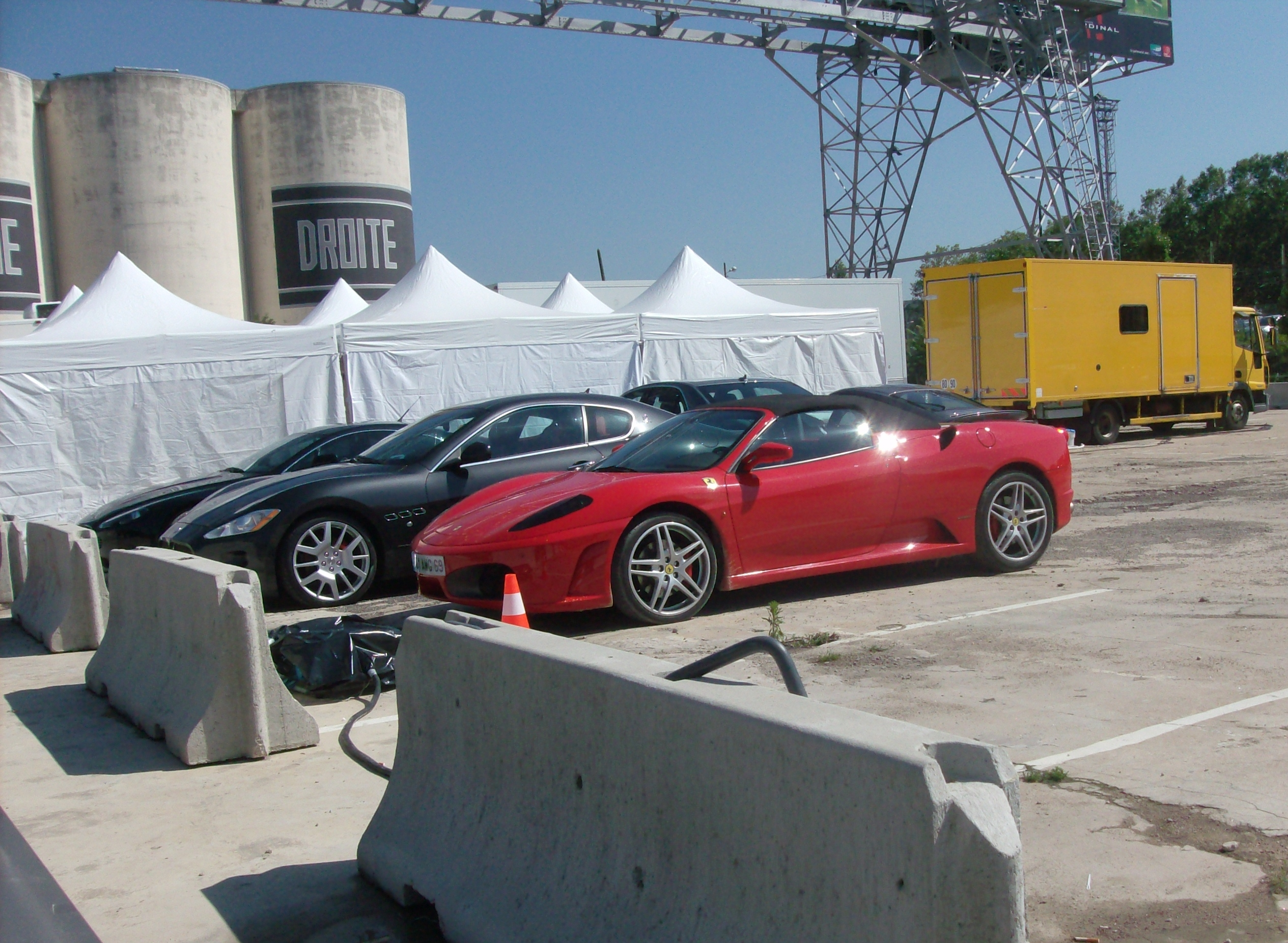 Ferrari F430 Spider, Maserati GranTurismo et Aston Martin DB9 coupe sur le tournage du film 11.6